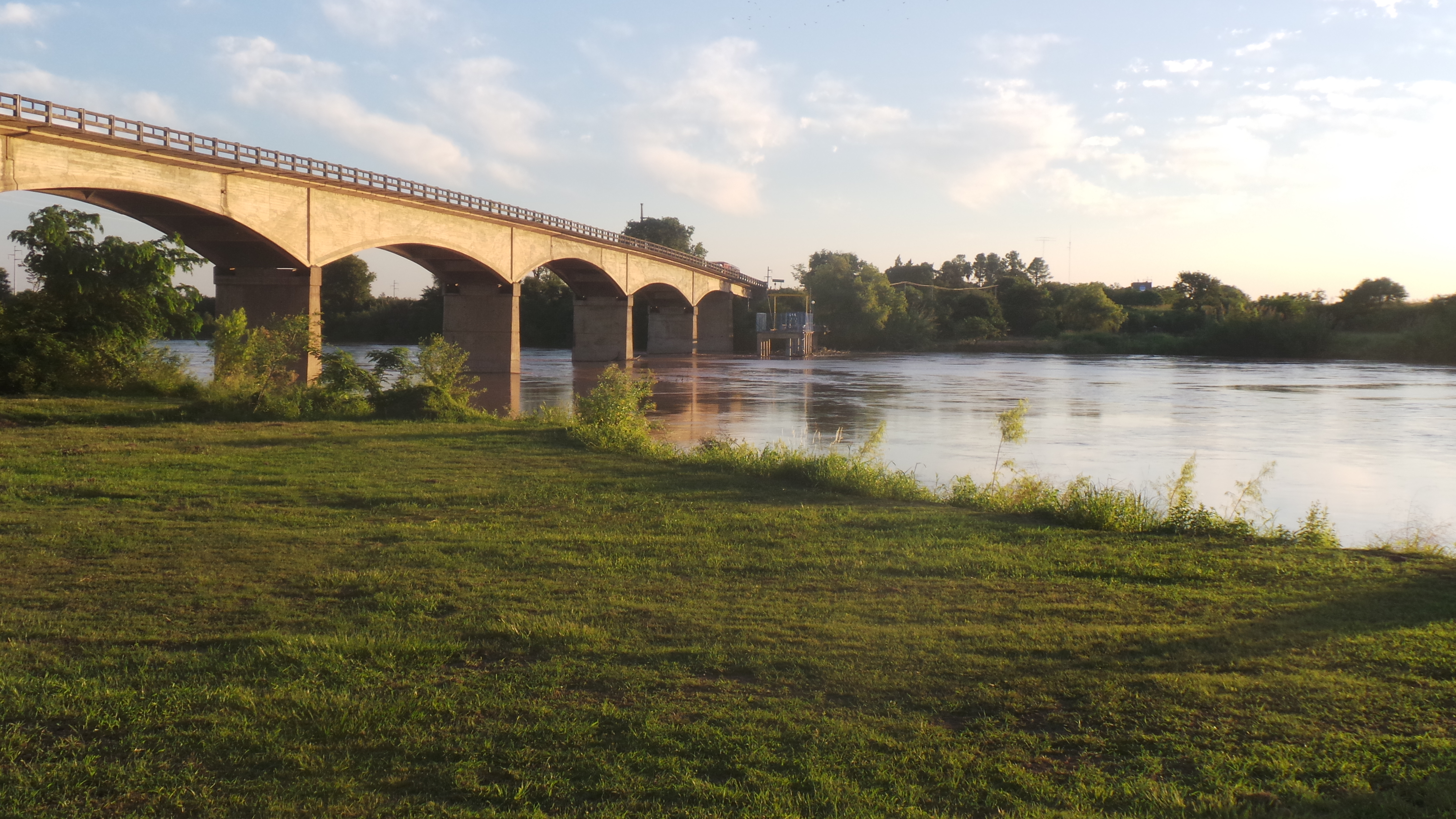 punte libertad, une la provincia de formosa y chaco